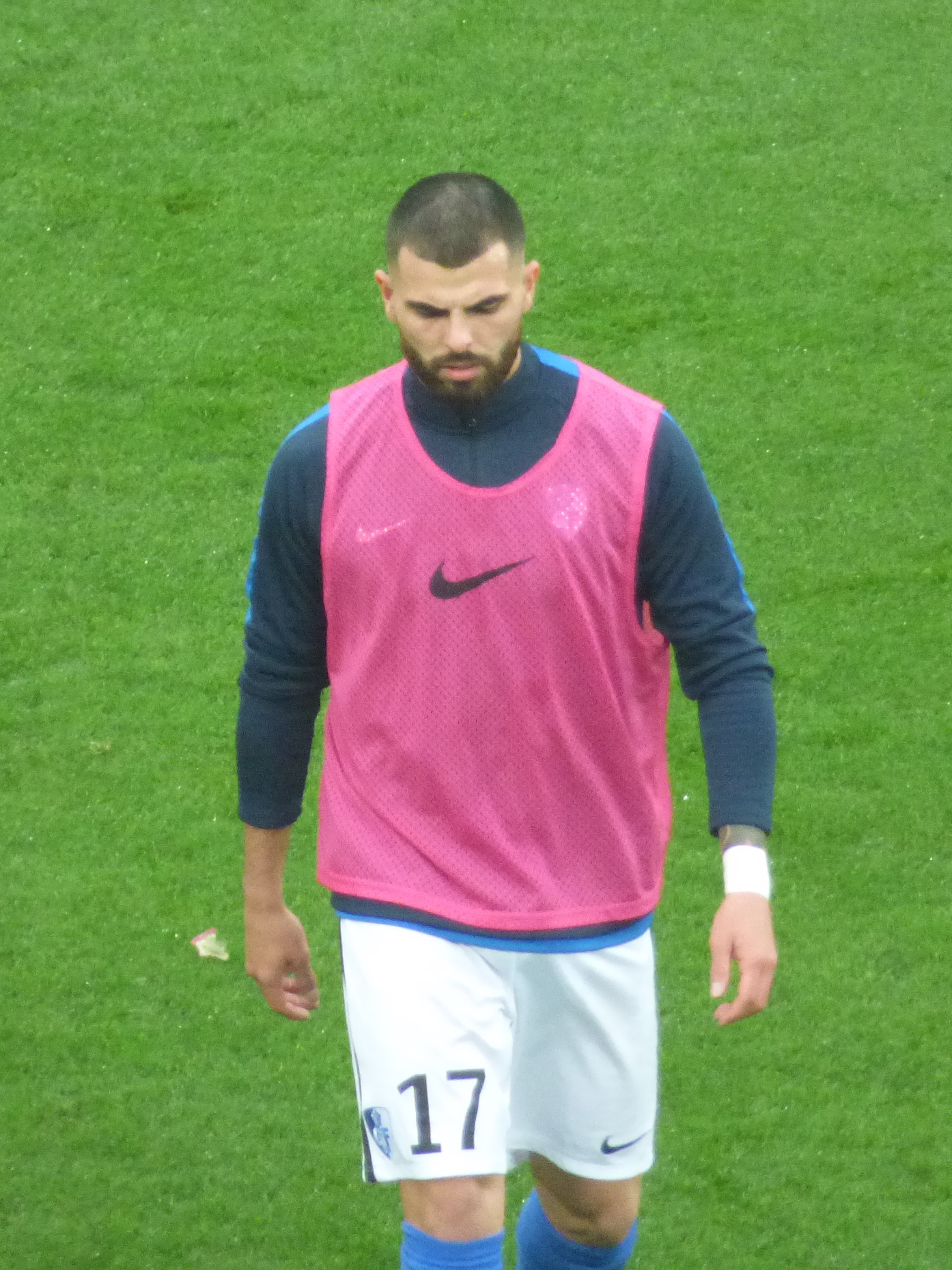 Maxime Spano Rahou avant le match RC Lens / Grenoble Foot 38, le 24 novembre 2018, comptant pour la quinzième journée du championnat de France de football de Ligue 2 2018-2019, au Stade Bollaert-Delelis.